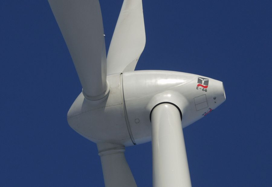 Szélturbina gondolája, Nezsider (Neusiedl am See), Burgenland, Ausztria